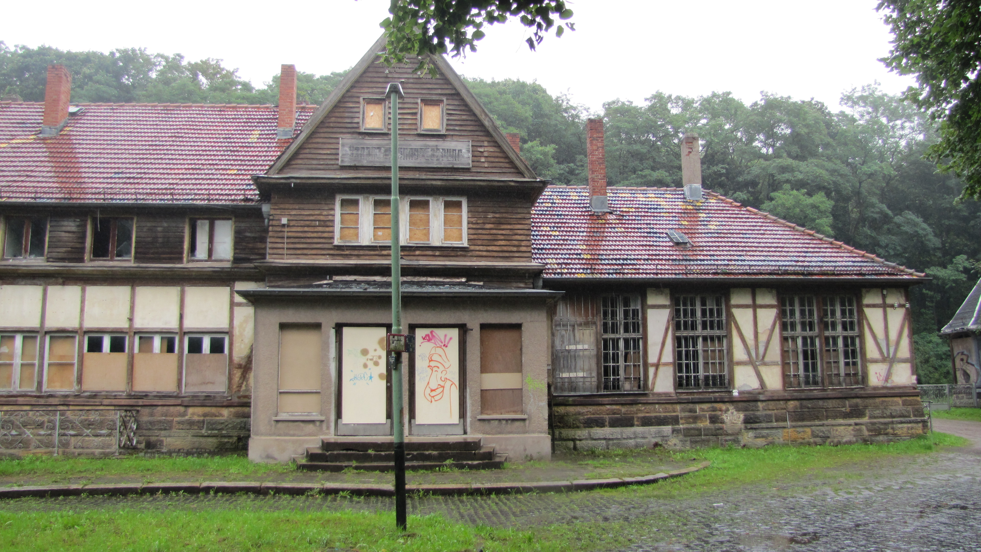 Empfangsgebäude Haltepunkt Rheinhardsbrunn-Friedrichroda